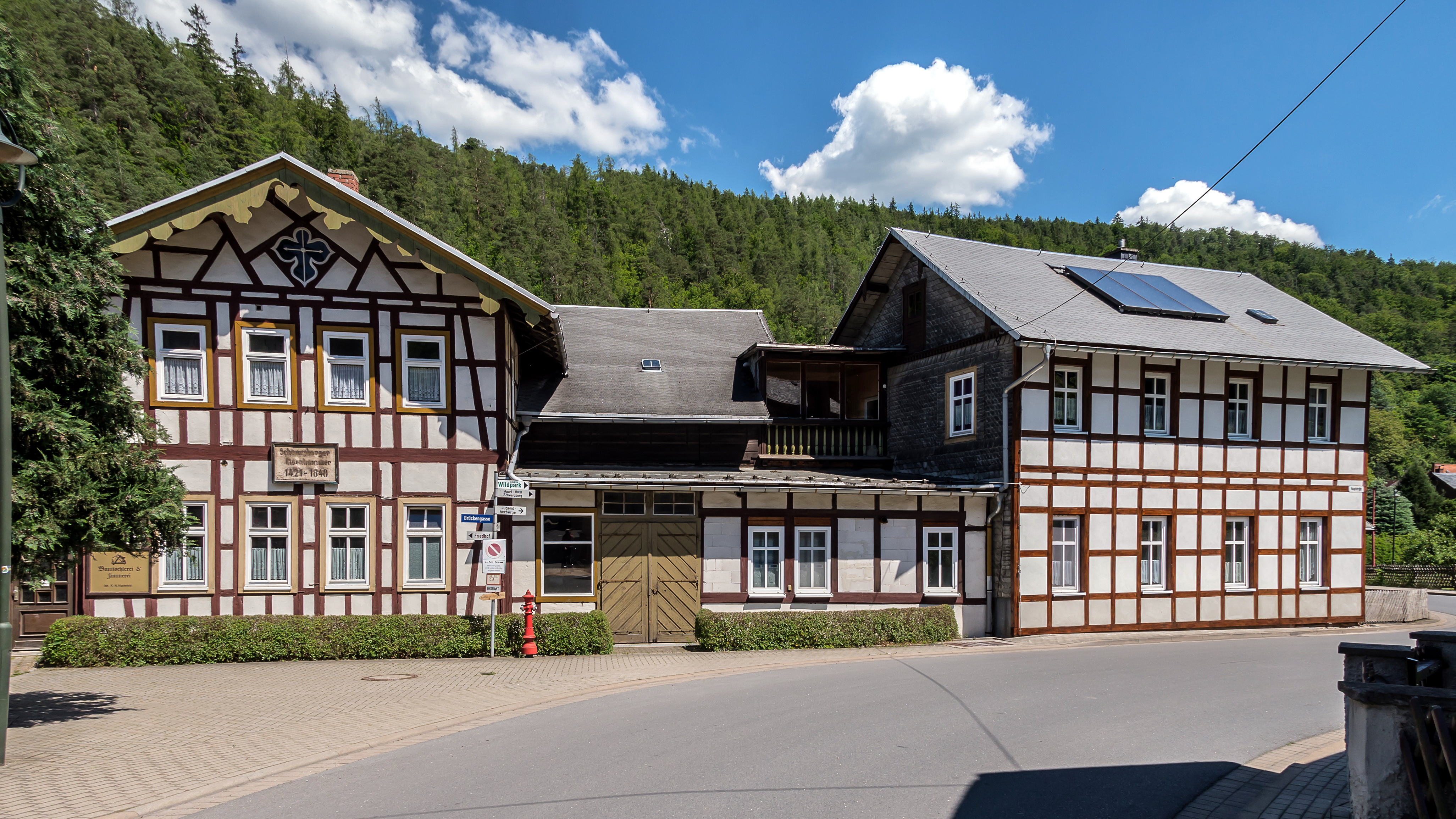 Denkmalgeschützte Sägemühle Schwarzburg Hauptstraße 20